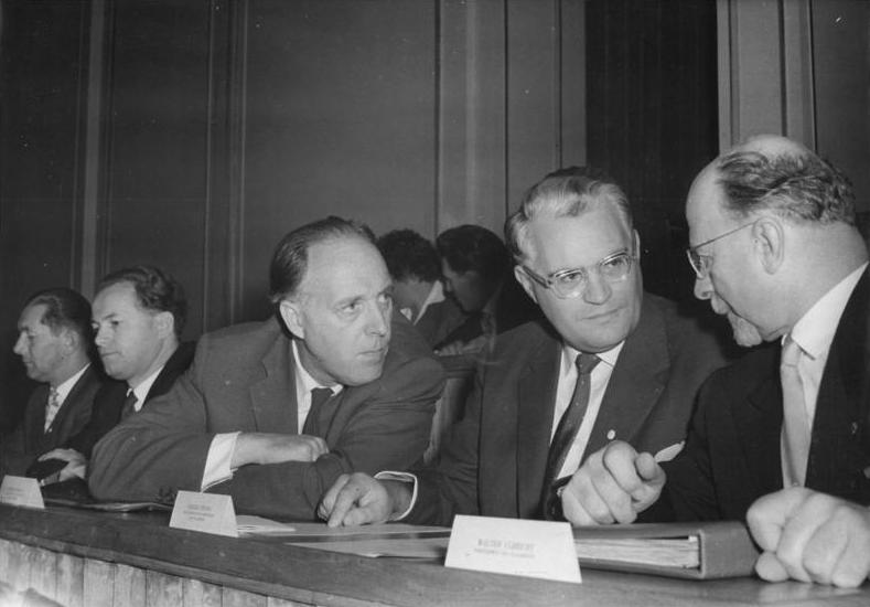 Zentralbild/Sturm-Zühlsdorf - 4.10.1960 15. Sitzung der Volkskammer der DDR Im In- und Ausland mit größtem Interesse erwartet, ist die Volkskammer der Deutschen Demokratischen Republik am 4.10.1960 um 11.00 Uhr zu ihrer 15. Sitzung zusammengetreten. Auf der Tagesordnung stehen eine Erklärung des Staatsrates der Republik, das "Gesetz über die Anpassung von gesetzlichen Bestimmungen an die Bildung des Staatsrates der Deutschen Demokratischen Republik" in erster und zweiter Lesung sowie Anzeigen des Ausschusses für Eingaben der Bürger. UBz.: Der Vorsitzende des Staatsrates der DDR, Walter Ulbricht, unterhält sich mit seinen Stellvertretern Gerald Götting (Mitte) und Heinrich Homann (links)